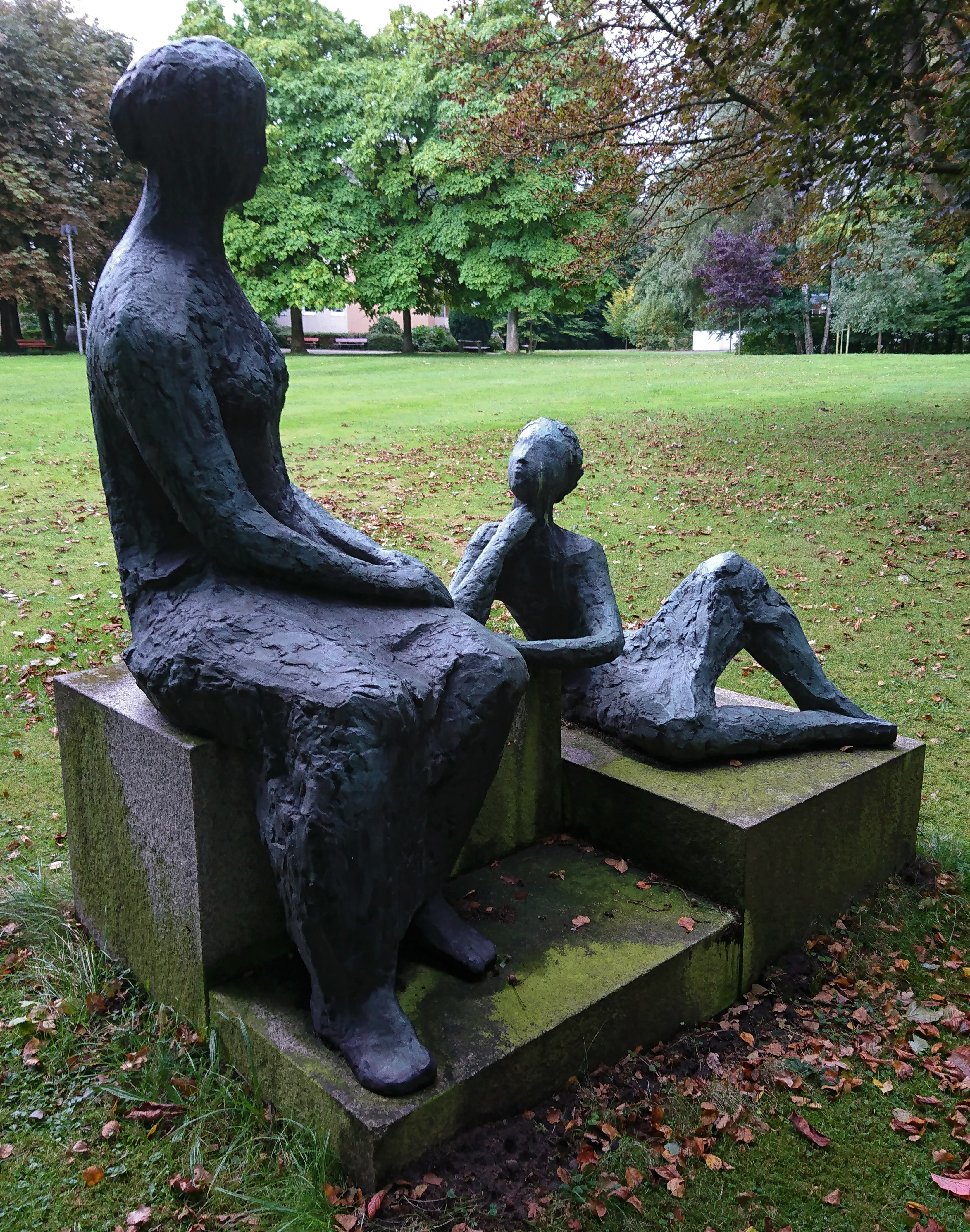 Zwiegespräch von Sabine von Diest-Brackenhausen, aufgestellt 1975, Schröder-Stift, Kiwittsmoor 6